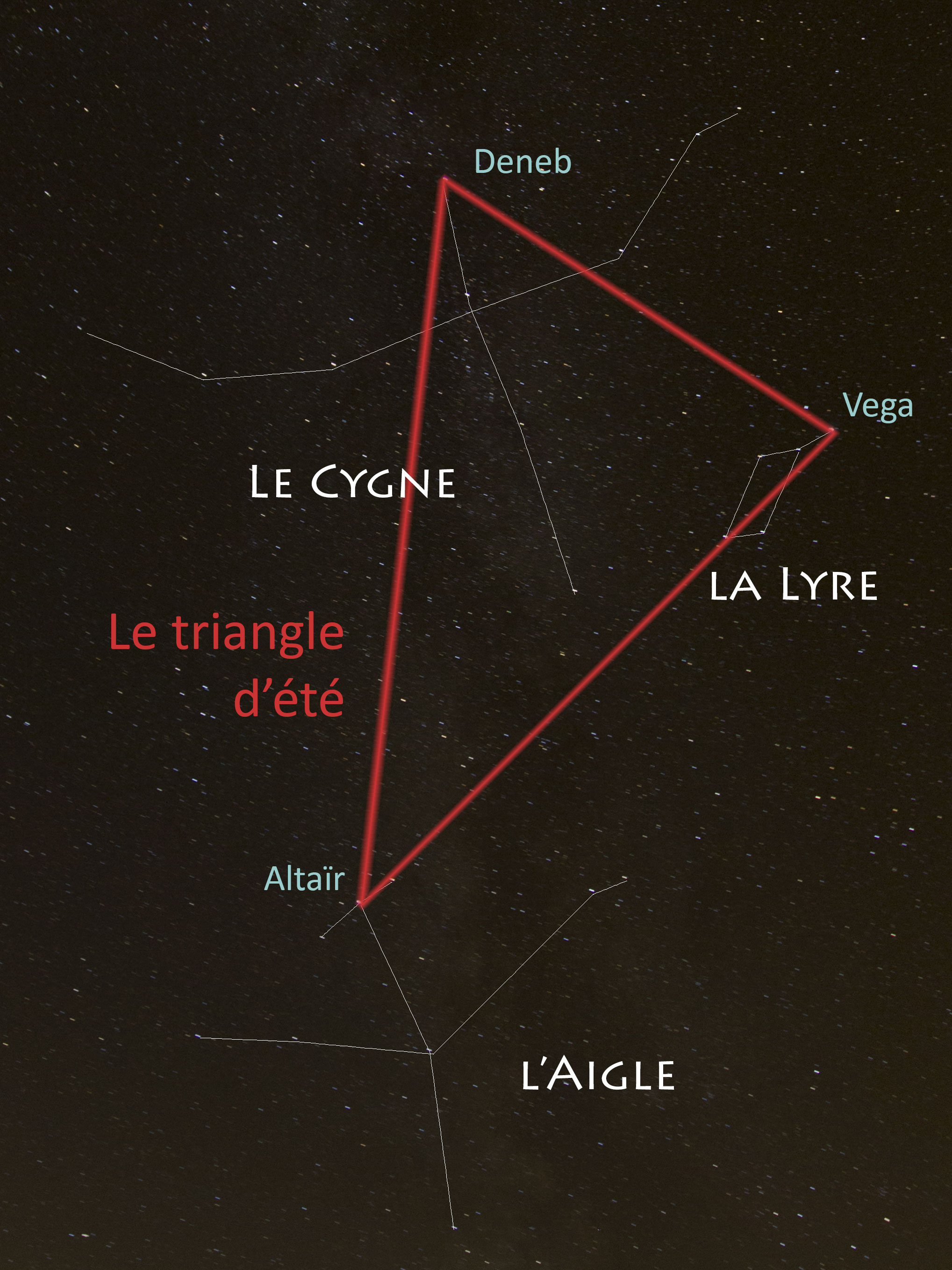 Triangle d'été issu de photos astronomiques prises le 2012-09-08 au Champ du feu. Ajout manuel des principales constellations et étoiles. Les trainées visibles au zoom maximum viennent du fait qu'il s'agit de poses de 1 minute sur trépied